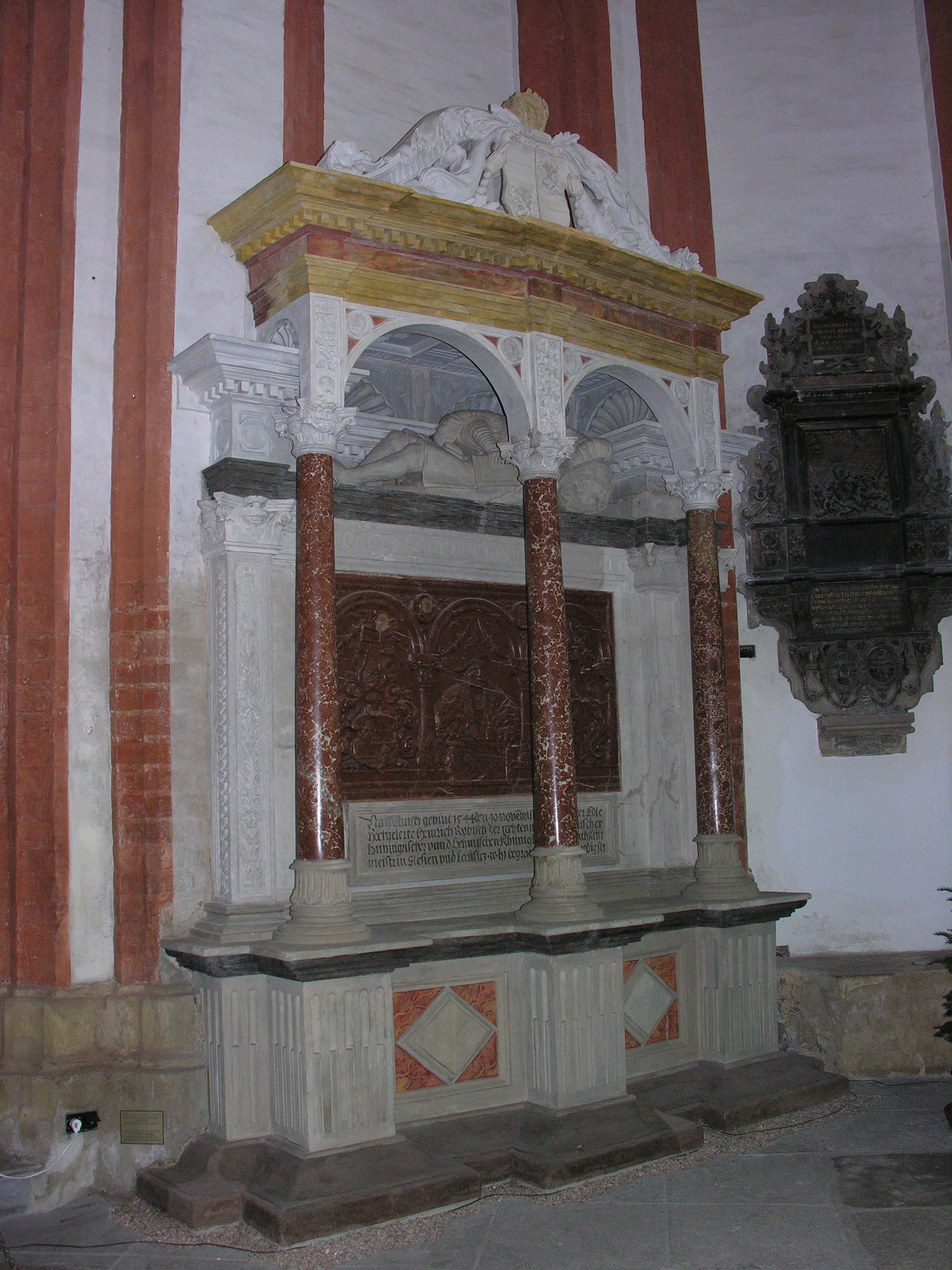 Nagrobek Henryka Rybischa w kościele św. Elżbiety we Wrocławiu